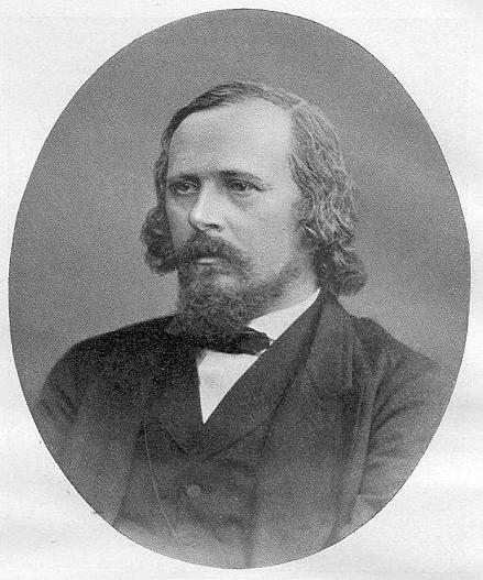 Heinrich Brunn (1822–1894), deutscher klassischer Philologe. Originalphotographie aus dem Besitz der Universitätsbibliothek München.